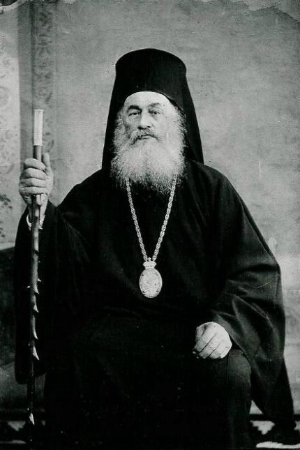 Πατριάρχης Ιωακείμ Γ΄ (1834 - 1912)